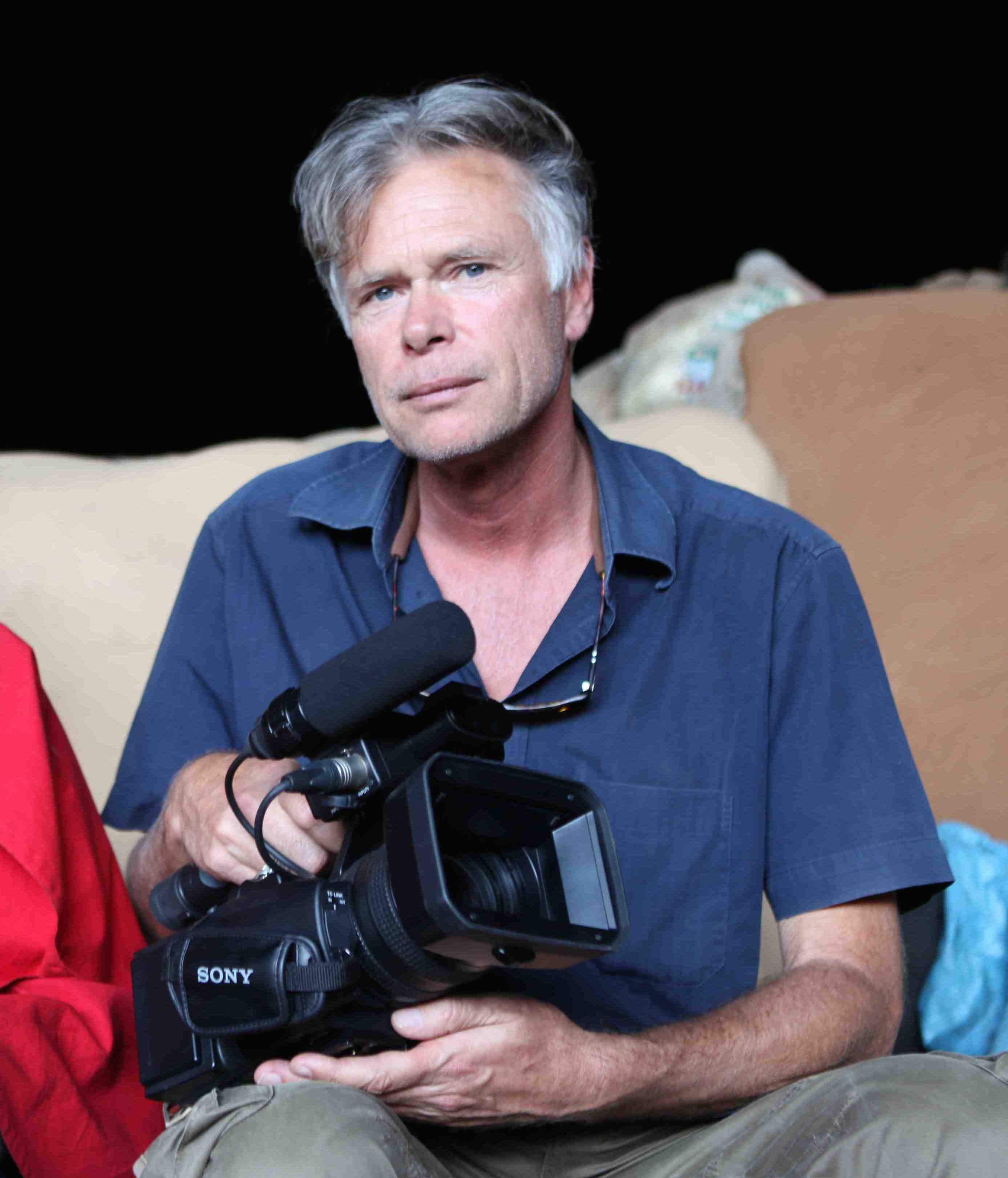 Ton van der Lee Lesotho 2014